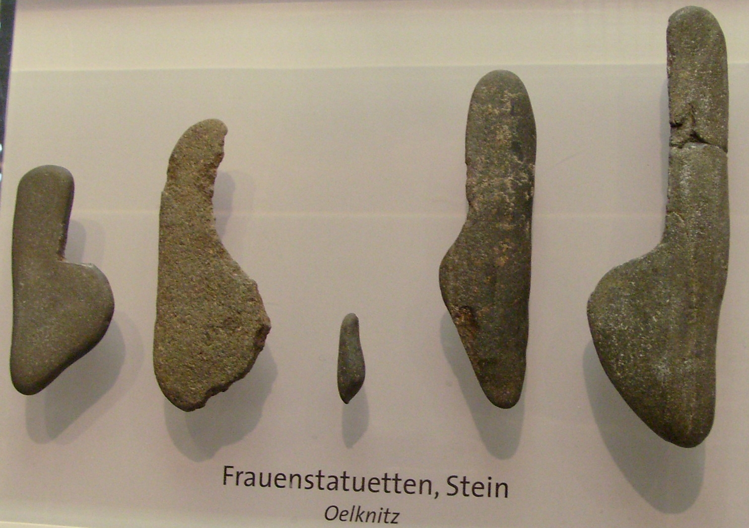 Frauen-Statuetten aus dem Grabungsfund bei Oelknitz